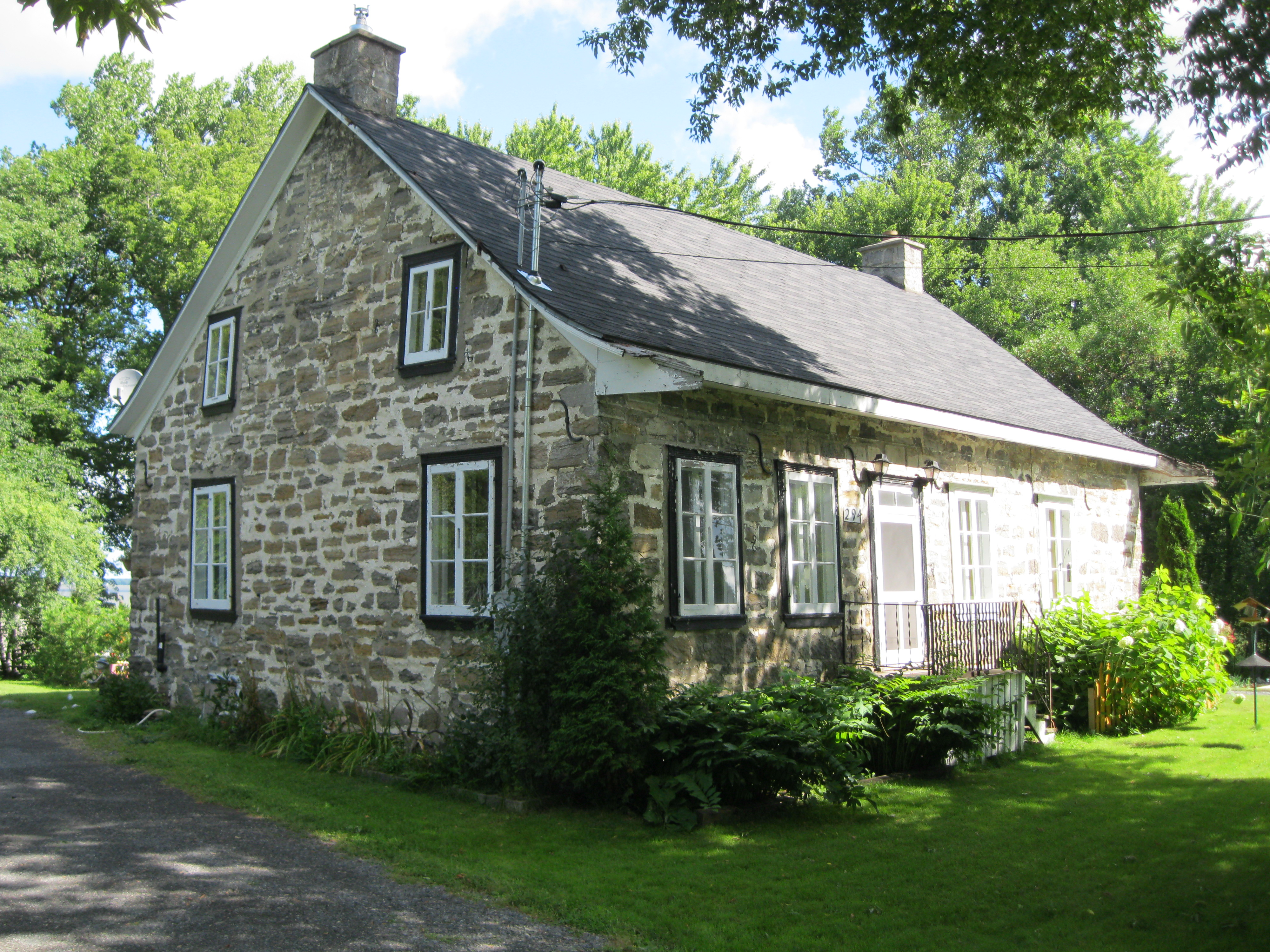 La maison Eustache-Rouleau est située au 294, chemin Senneville, Senneville. Elle fait partie du parc agricole du Bois-de-la-Roche. Grand répertoire du patrimoine bâti de Montréal